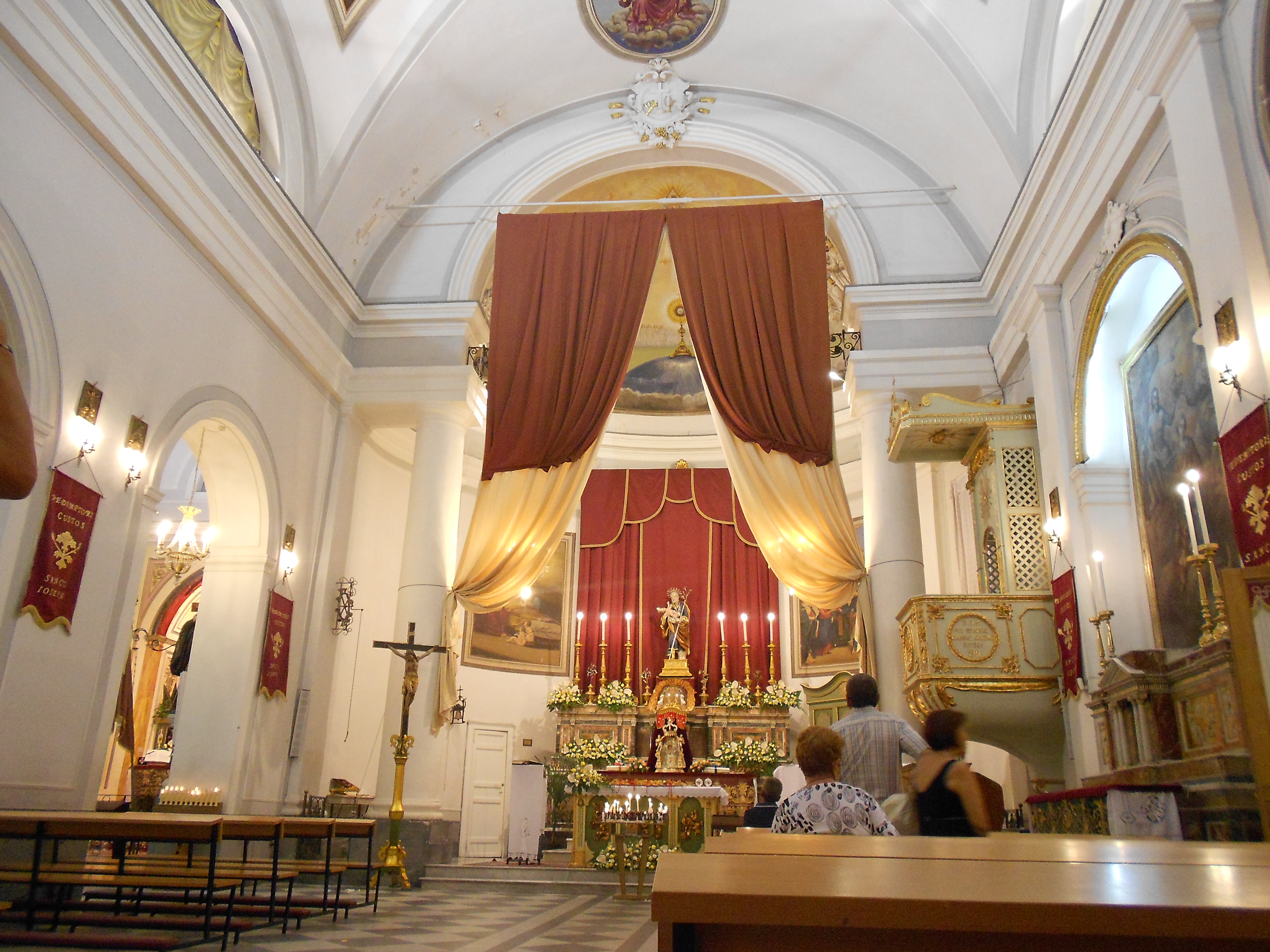 Interno Chiesa del Santissimo Crocifisso - chiesa madre di Santa Maria di Licodia - durante la festa patronale